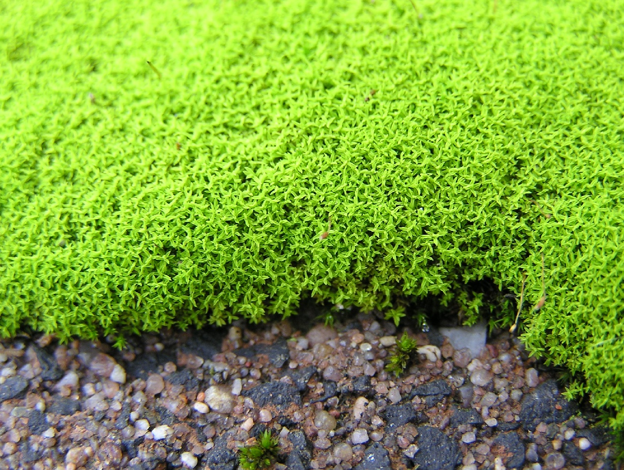 Barbula convoluta in Pflasterritzen in der Nähe von Neuss (Deutschland).